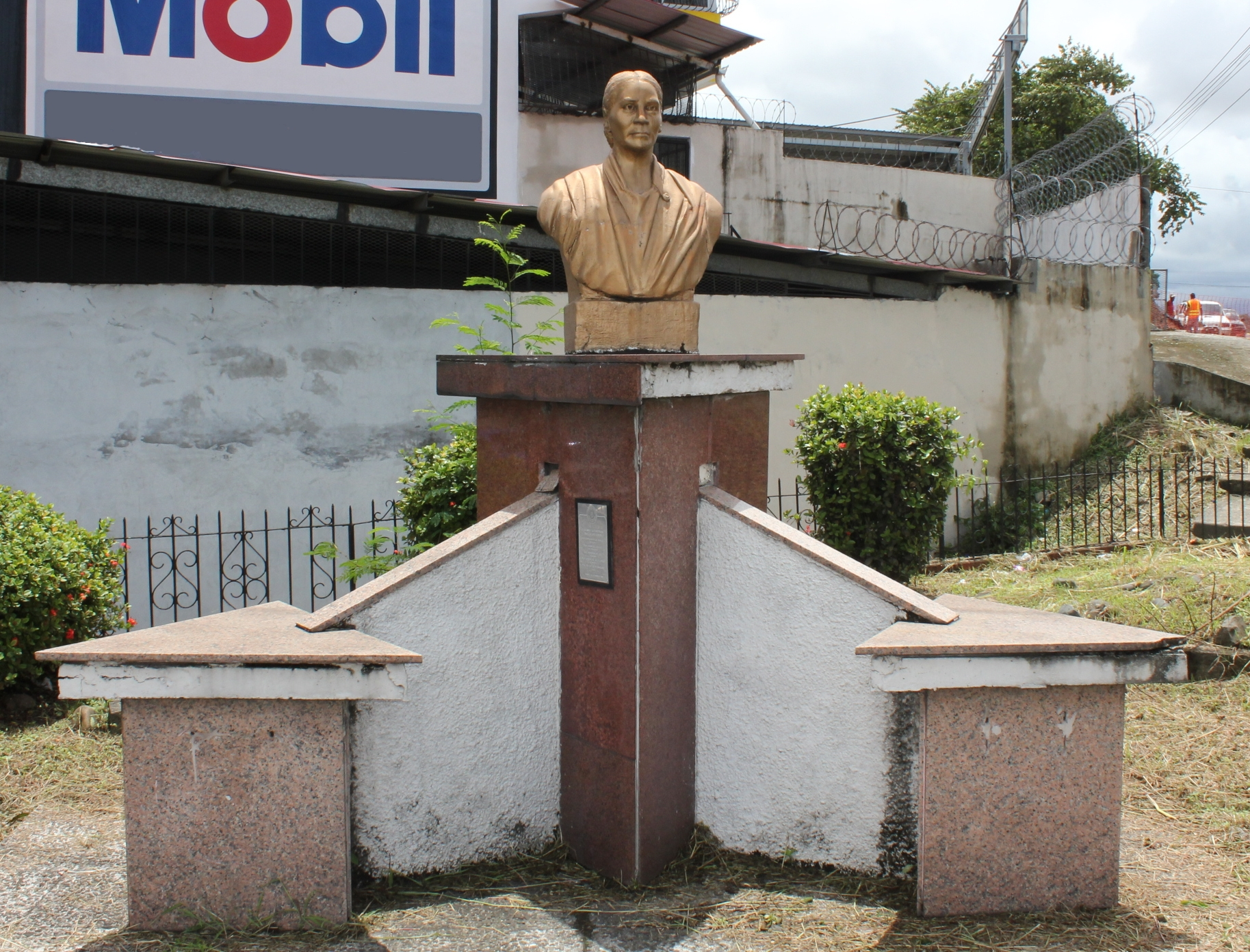 Busto de la educadora y dirigente magisterial Sara Sotillo, ubicado en el corregimiento de Bethania, ciudad de Panamá, Panamá.